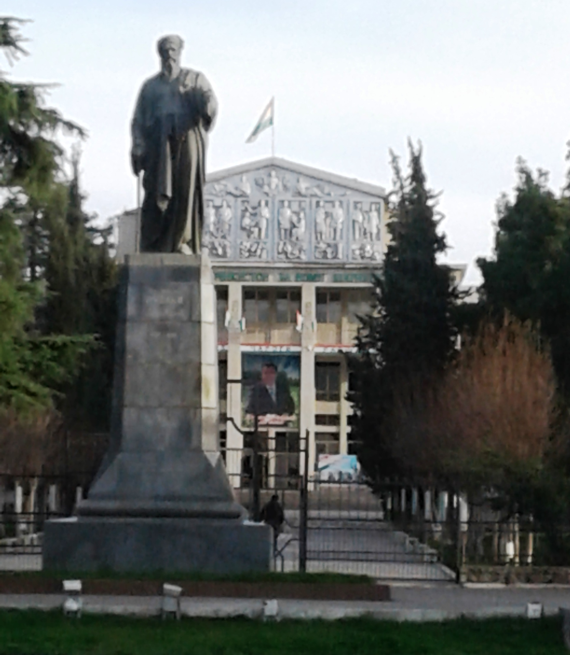 Памятник поэту таджикско-персидской литературы Абуабдулло Рудаки (10 век), г. Душанбе